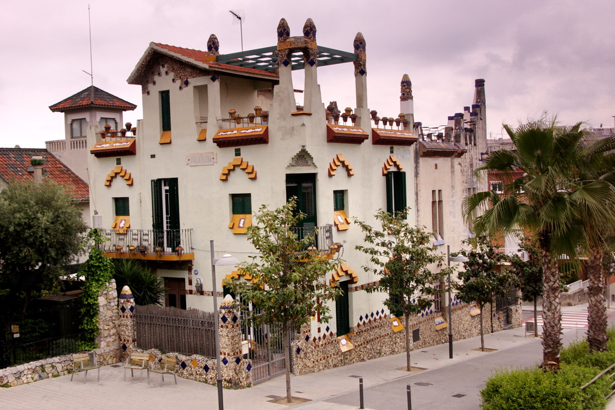 Cases Anzizu (en primer pla, Villa Elena, i darrera, Villa Jose, obra de Ignasi Mas Morell de 1910, a Sant Joan Despí al Baix Llobregat, Catalunya.